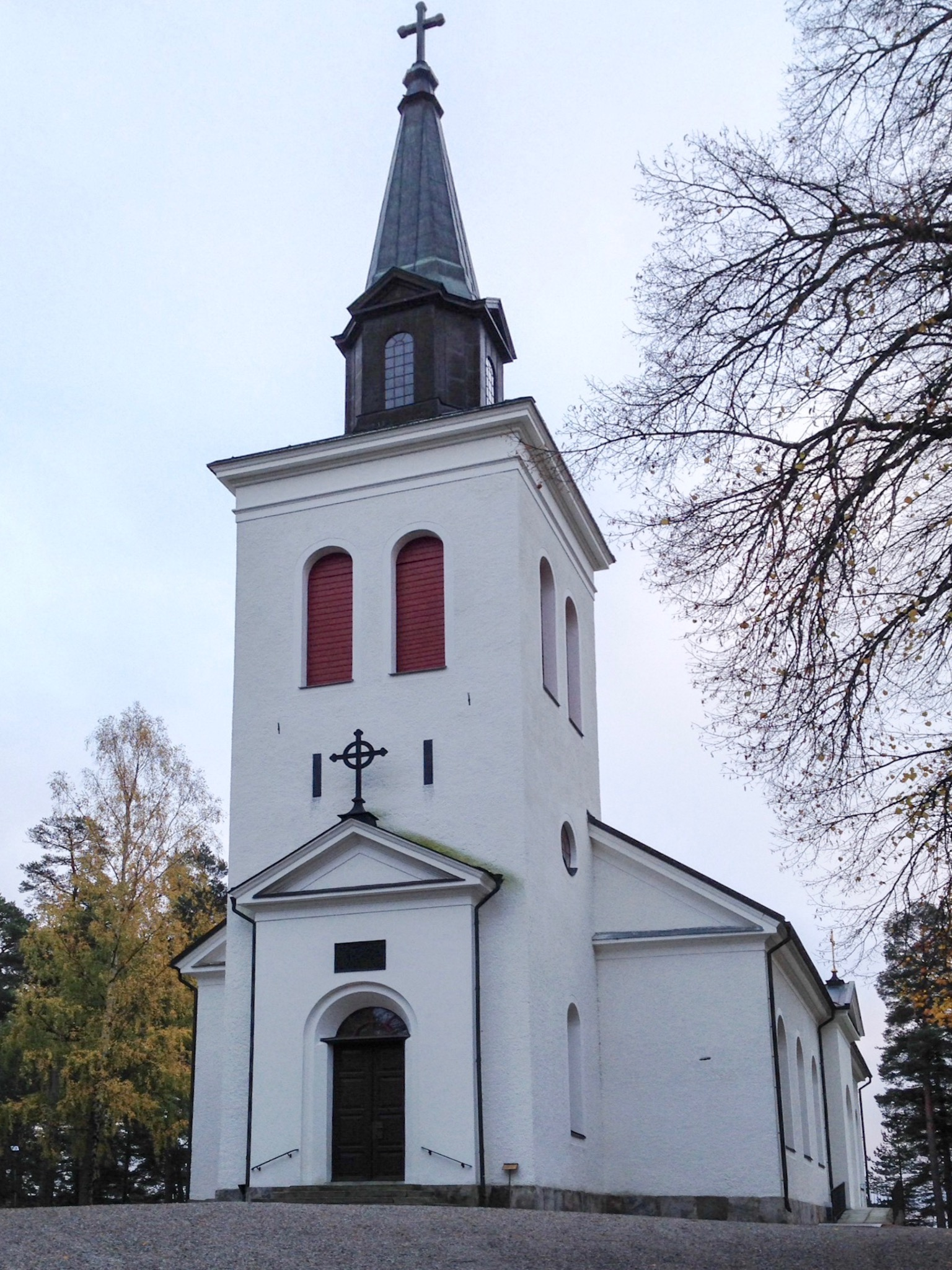 Västra Fågelviks kyrka (Fågelviks stom 1:34)